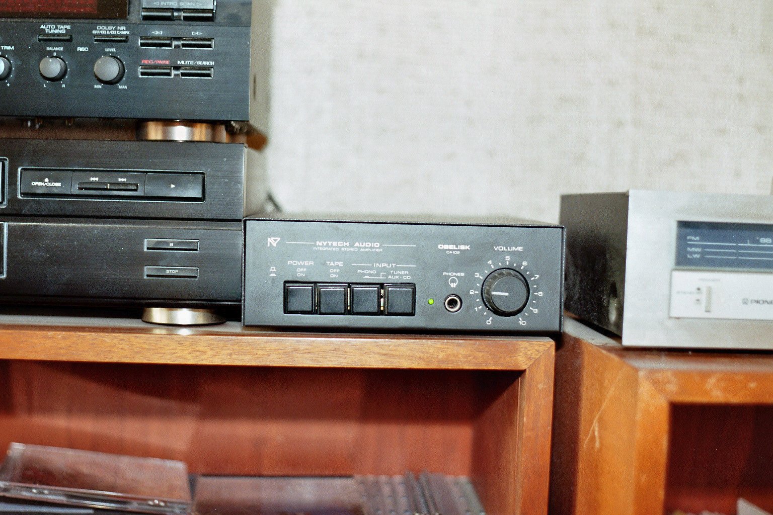 Hifi-Verstärker von 1995 Nytech Audio OBELISK CA102